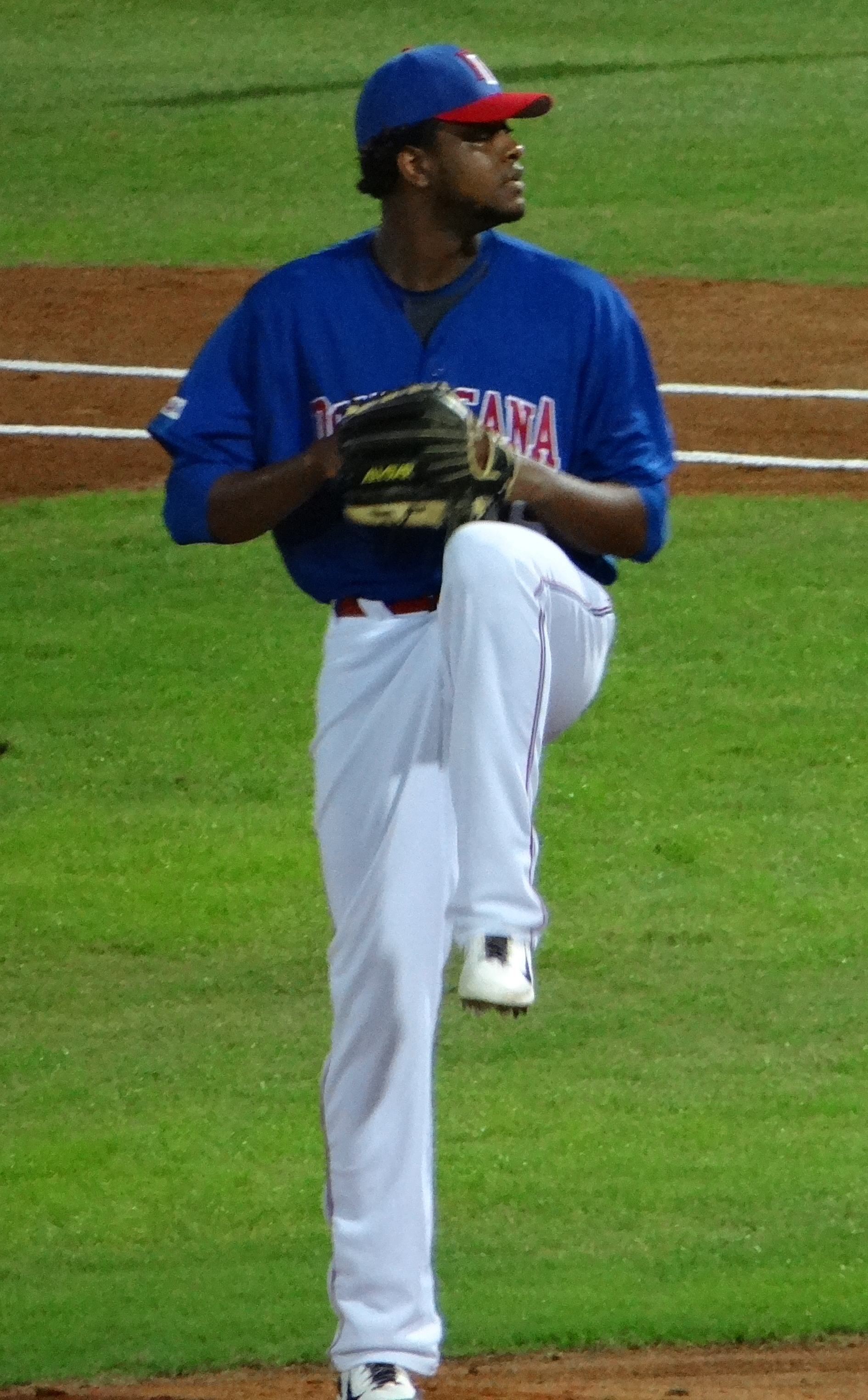 Victor Mateo